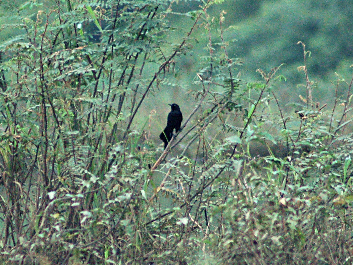 Nicaraguan Grackle Quiscalus nicaraguensis, Rio Frio boat ride, Caño Negro, Alajuela Province, Costa Rica